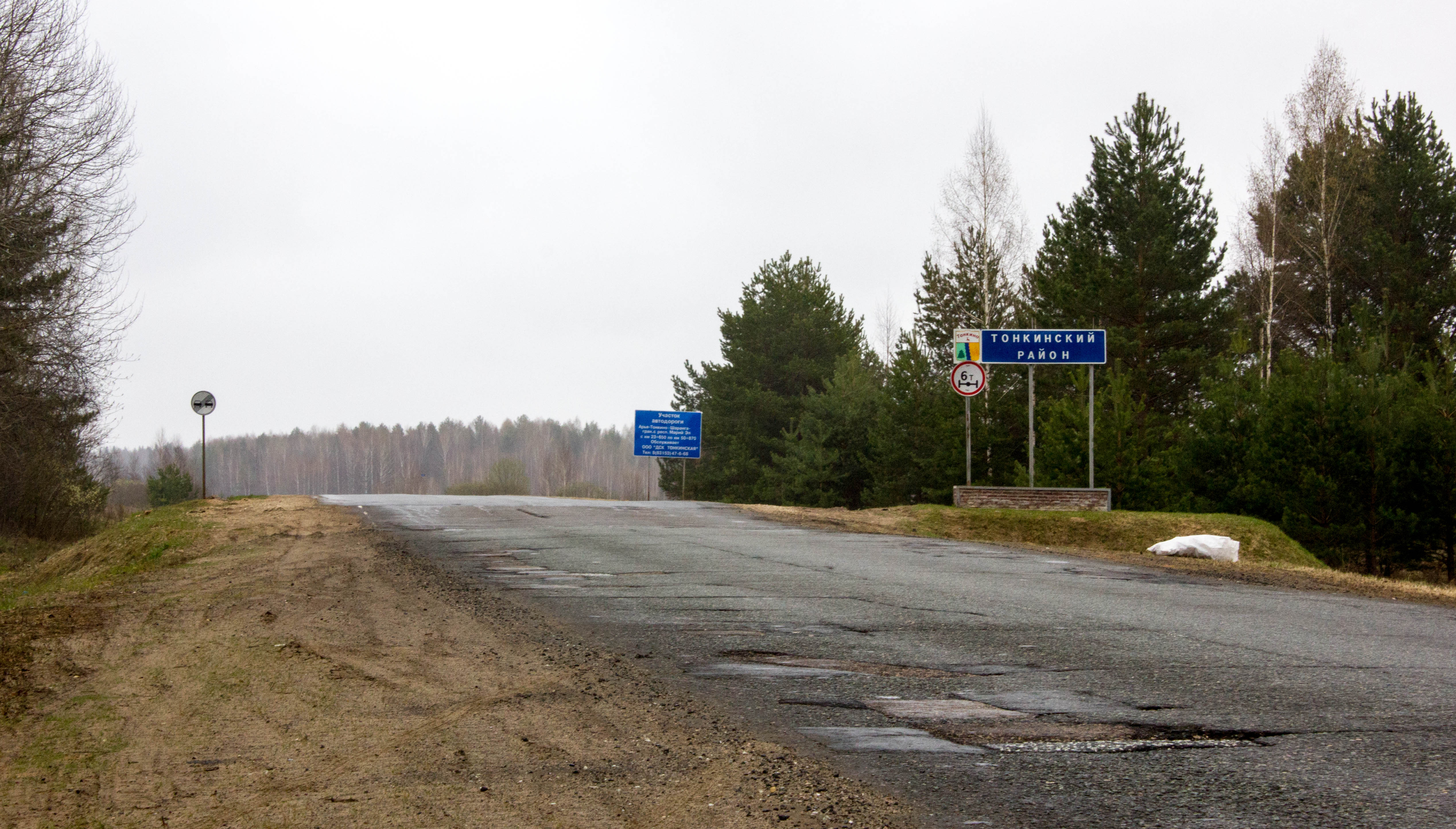 Граница Тонкинского и Уренского районов